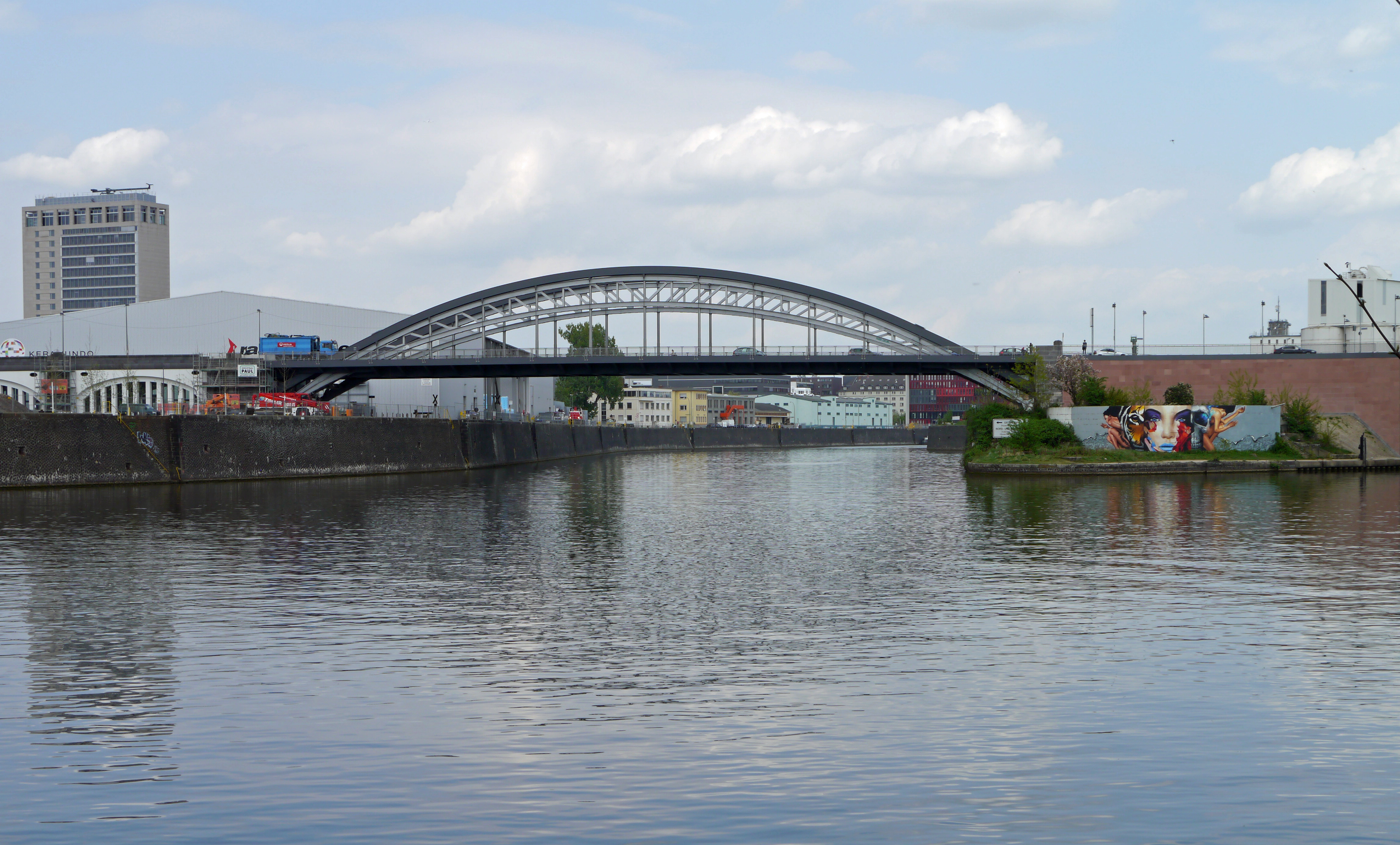 Die Honsellbrücke über der Zufahrt zum Unterhafen des Osthafens, 2014 in Frankfurt am Main. Ansicht vom gegenüberliegenden Mainufer in Ffm-Sachsenhausen.